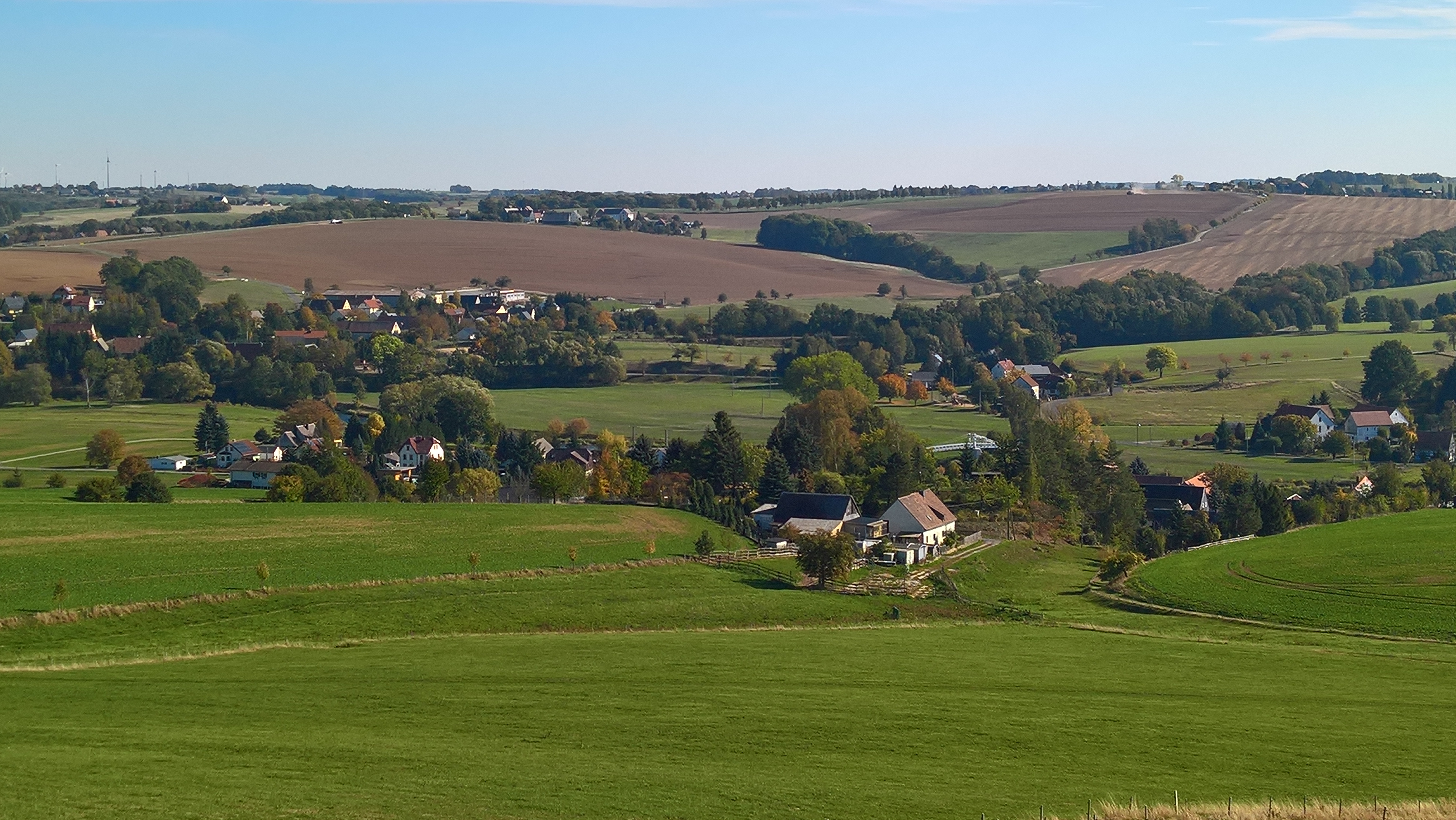 Muldentalblick vom Rochlitzer Berg nach Sörnzig (Vordergrund), Steudten (Bild links) und Fischheim (Bild rechts)